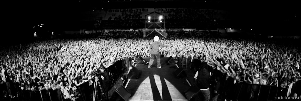 Dread Mar-I en Estadio All Boys // Buenos Aires // Argentina 2011